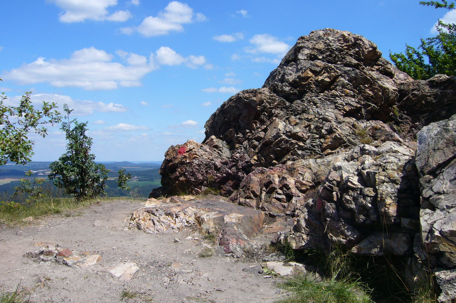 Plošina mezi skalami v hradním jádře